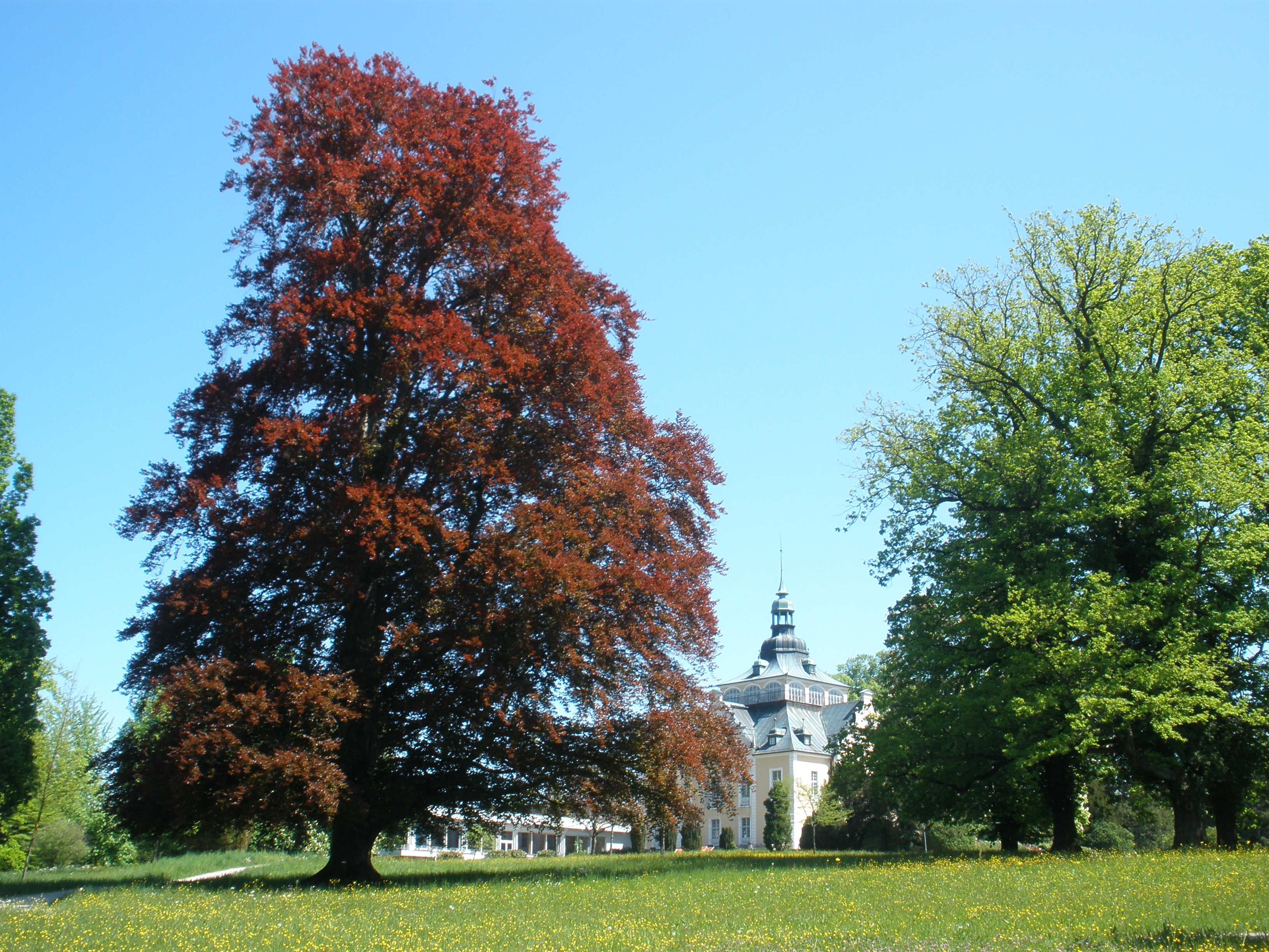 Park der Villa Toskana